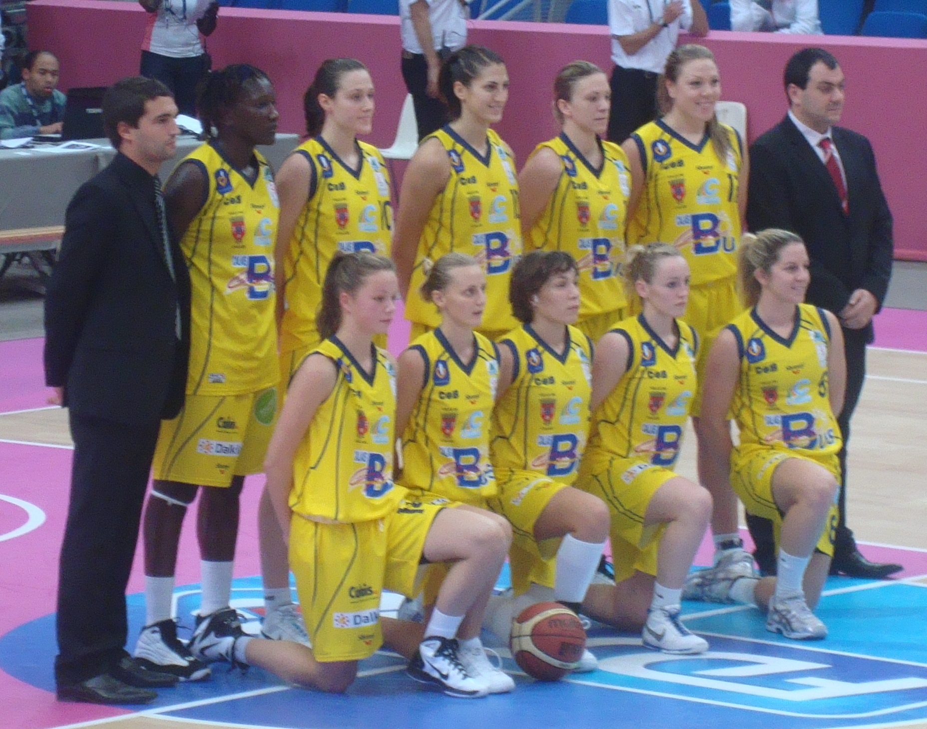 L'équipe de basket féminin du COB Calais